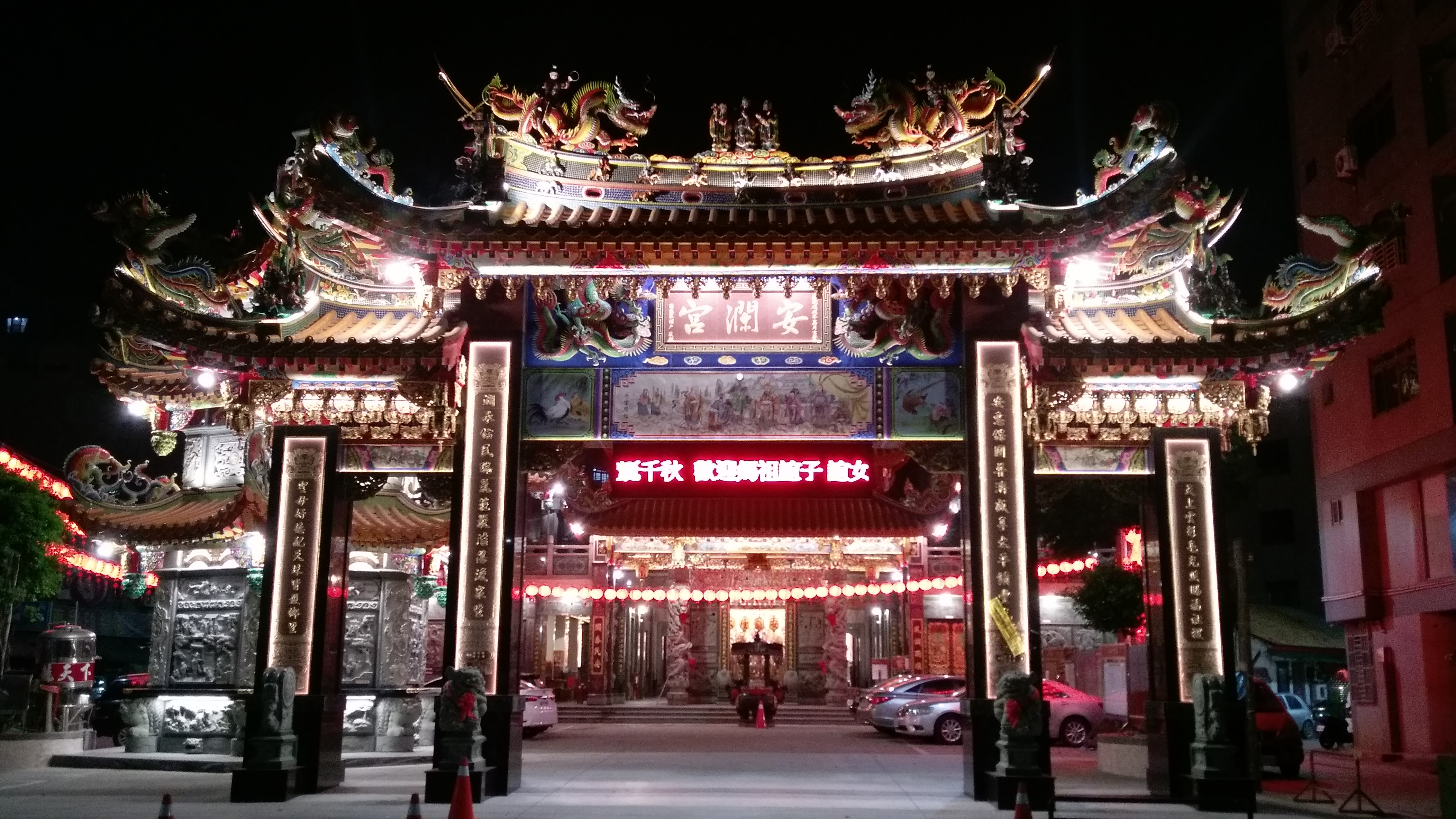 中文（台灣）: 苓雅寮安瀾宮牌坊